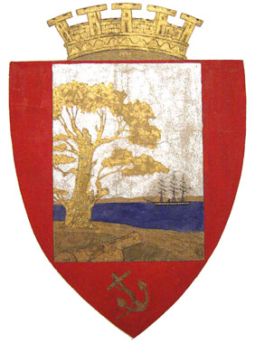 alternativt byvaapen Horten kommune